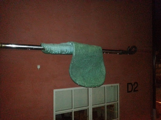 Pinnbröd (2011) - Anders Kappel It is not clear whether freedom of panorama applies to this image. This is a depiction of a building or work of art in Sweden. The depicted work is believed to be protected by copyright. According to Article 24 of the Swedish copyright act, "Works of art may be depicted if they are permanently placed on or at a public place outdoors. Buildings may be freely depicted." It has been widely accepted that this provision made distribution of depictions such as this one legal. On 4 April 2016, however, the Supreme Court of Sweden issued a statement that the first paragraph in Article 24 does not extend to publication in online repositories, and on 6 July 2017, a lower court ruled that linking to depictions of copyrighted artworks hosted on Commons in a database constitutes copyright infringement. See COM:CRT/Sweden#Freedom of panorama for more information. The second paragraph in the article, about buildings, was not evaluated in the statement or ruling. The implications of these decisions on Commons' ability to continue to distribute this and other depictions like it are currently under analysis. Reusing or linking to this file can have legal consequences, unless if the artist has died before 1 Jan 1950, to which either PD-Sweden-photo or PD-old-70 may applied. You are solely responsible for ensuring that you do not infringe the copyright belonging to someone else. See our general disclaimer for more information.